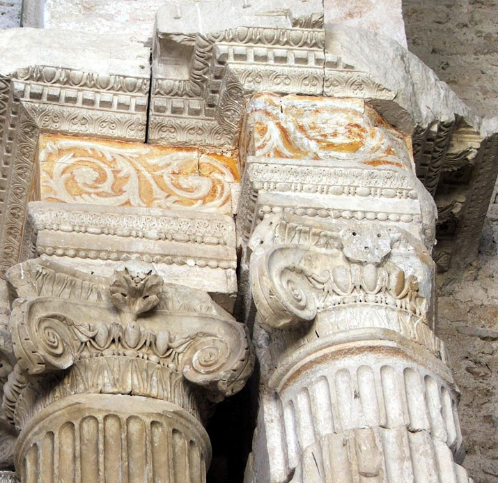 capitelli romani di spoglio riusati nella Basilica di San Salvatore (Spoleto) deframed on June 19th, 2007 by sailko